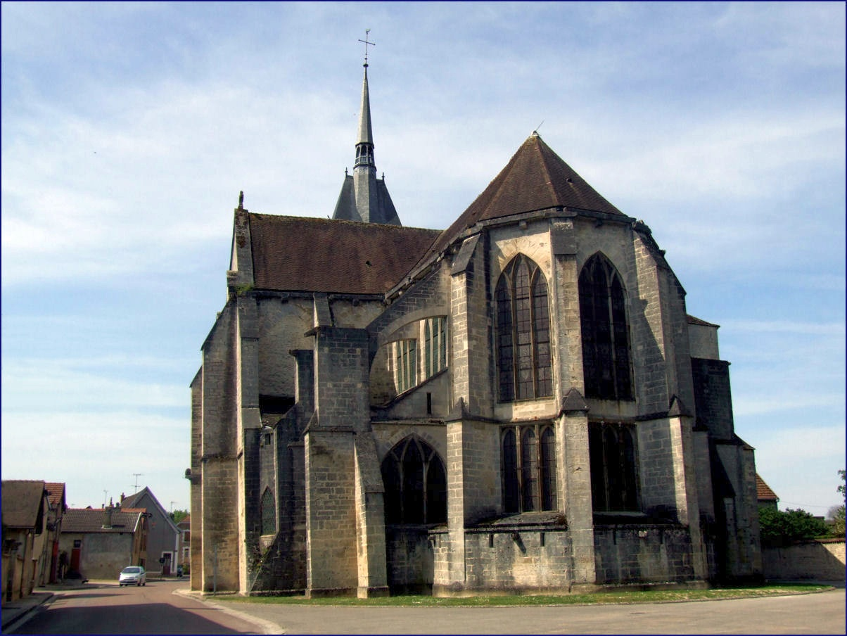 St. Pierre es Liens, Mussy-sur-Seine, France